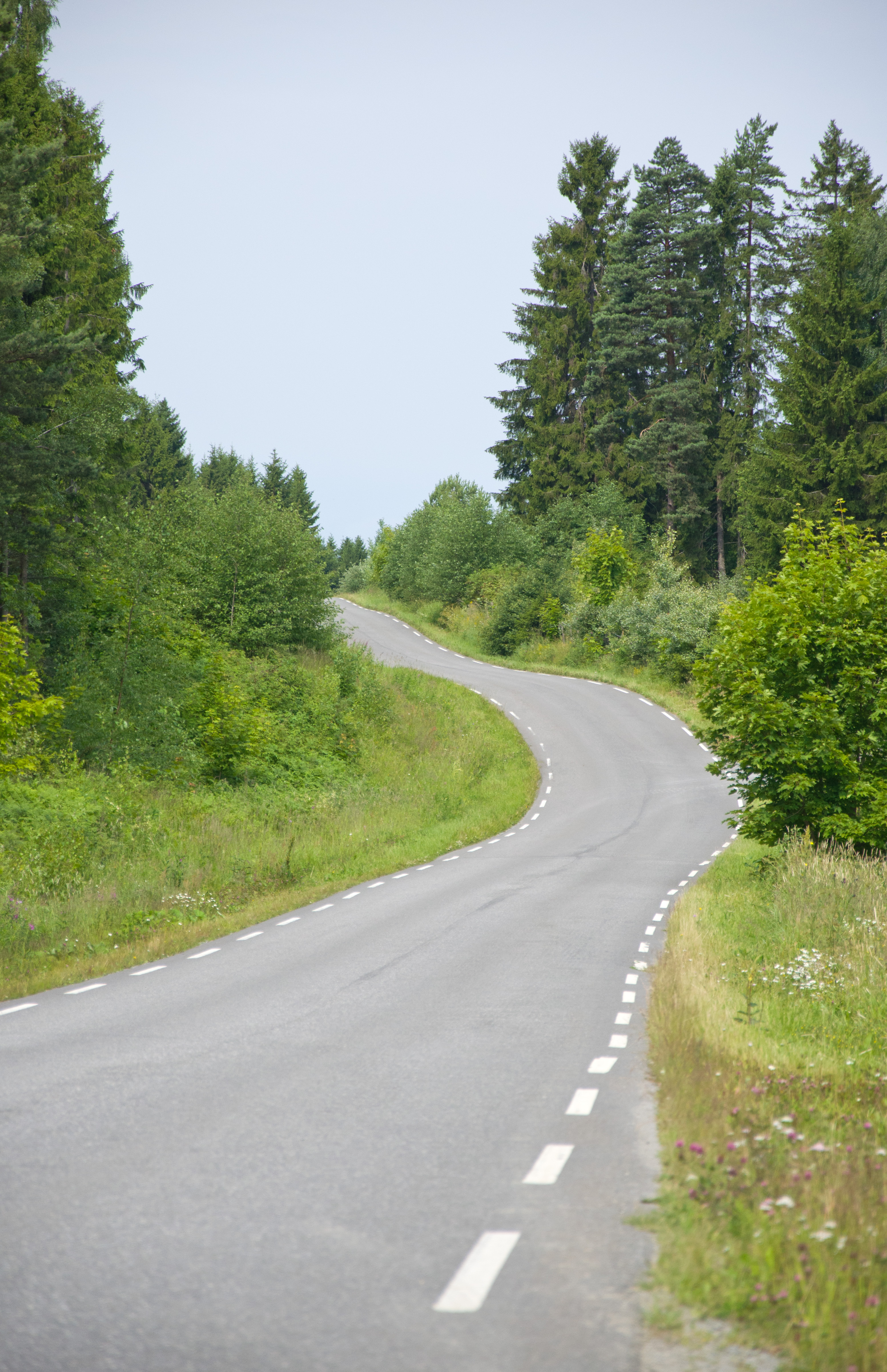 Fylkesvei 1744 (tidl. 72), Frøbergvegen i Hedmark